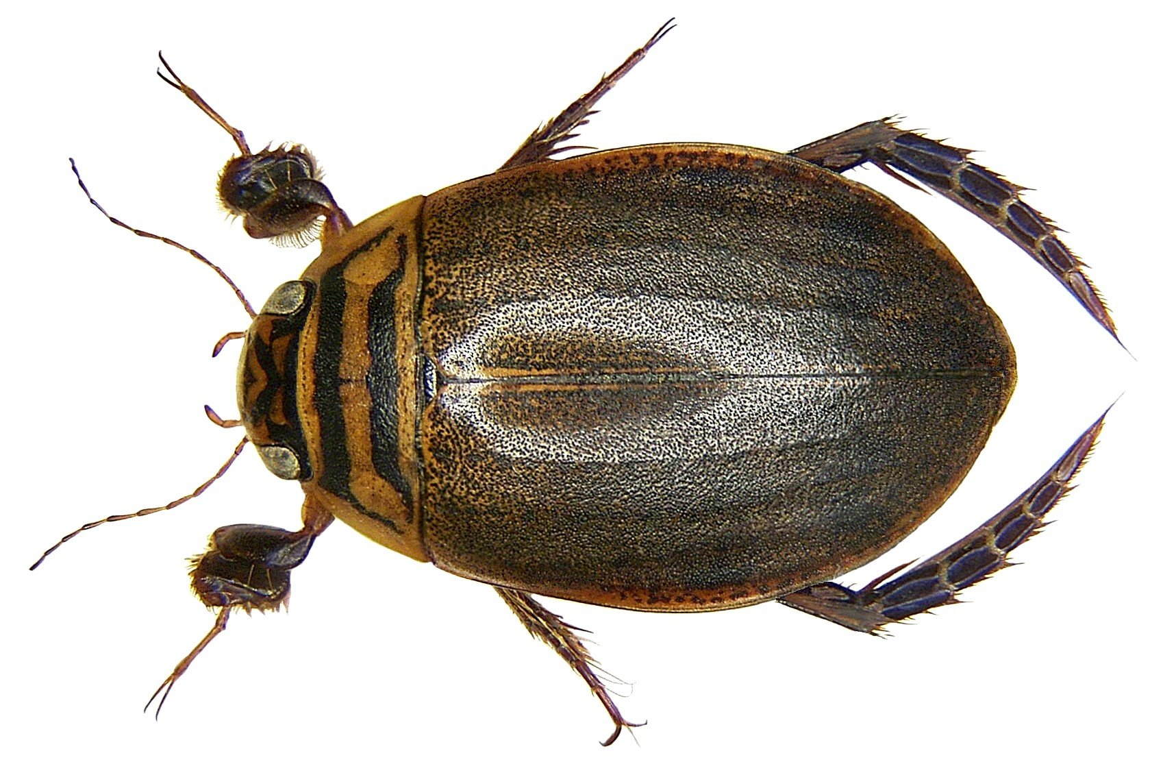 Acilius sulcatus (Linné, 1758) male Familie: Dytiscidae Groesse. 15-18 mm Fundort: Germania, Bayern, Oberfranken, Selbitz leg. det. U.Schmidt, 1971 Photo: U.Schmidt, 2008